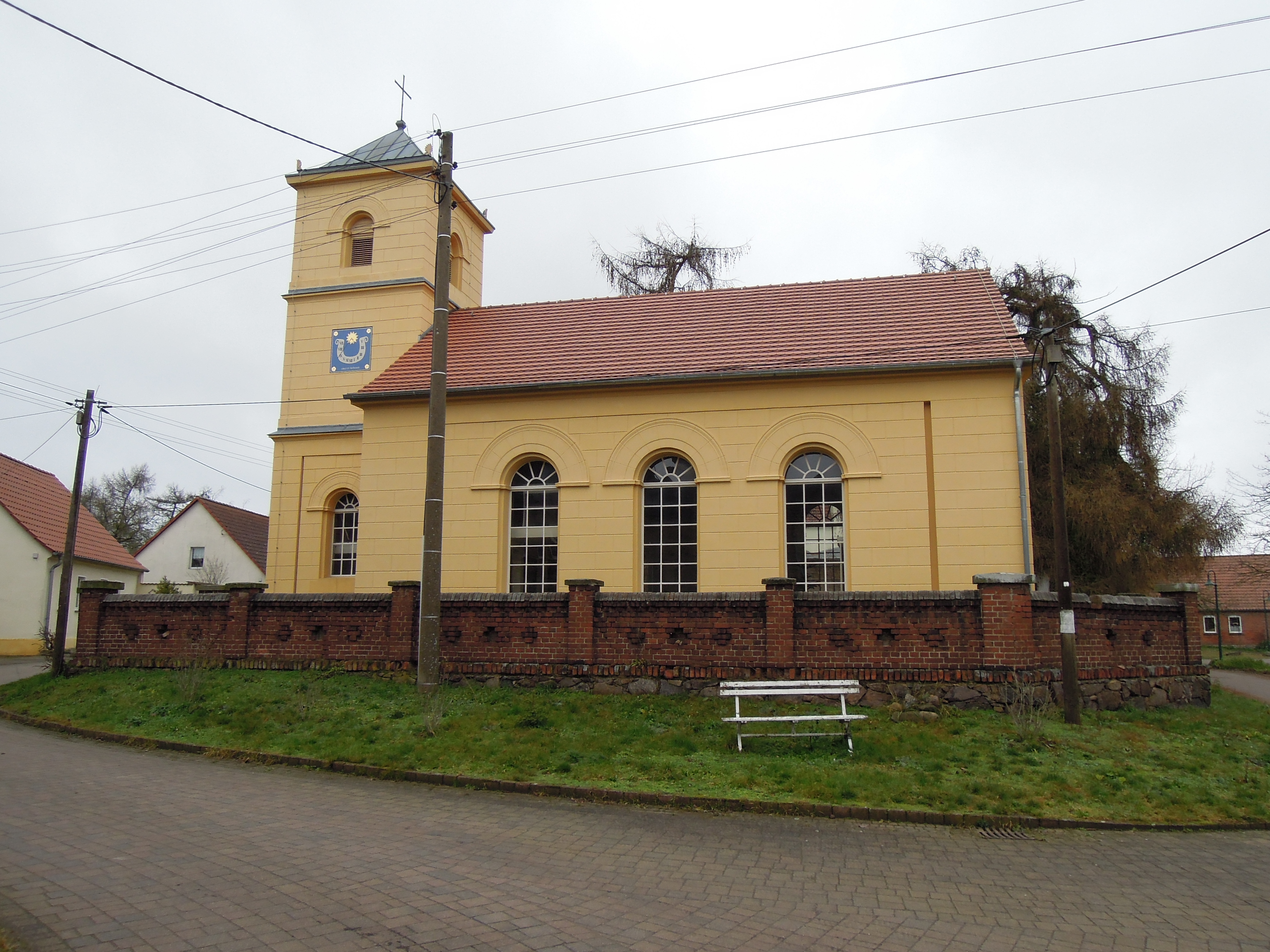 Kirche Woltersdorf -Südansicht- Ende Dezember 2019